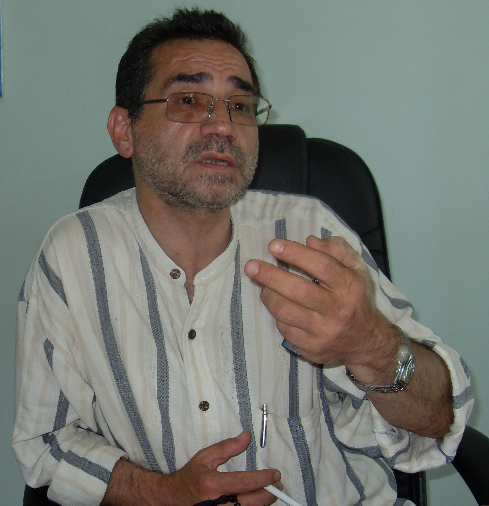 Արմեն Մազմանյան, հայ դերասան, ռեժիսոր, Երևանի թատրոնի և կինոյի պետական ինստիտուտի ռեկտոր: Երևան, 2010 թ.